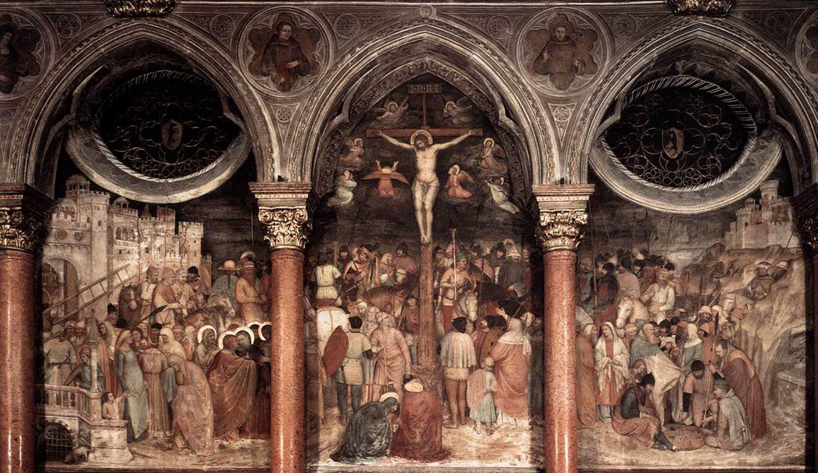 (dettaglio)